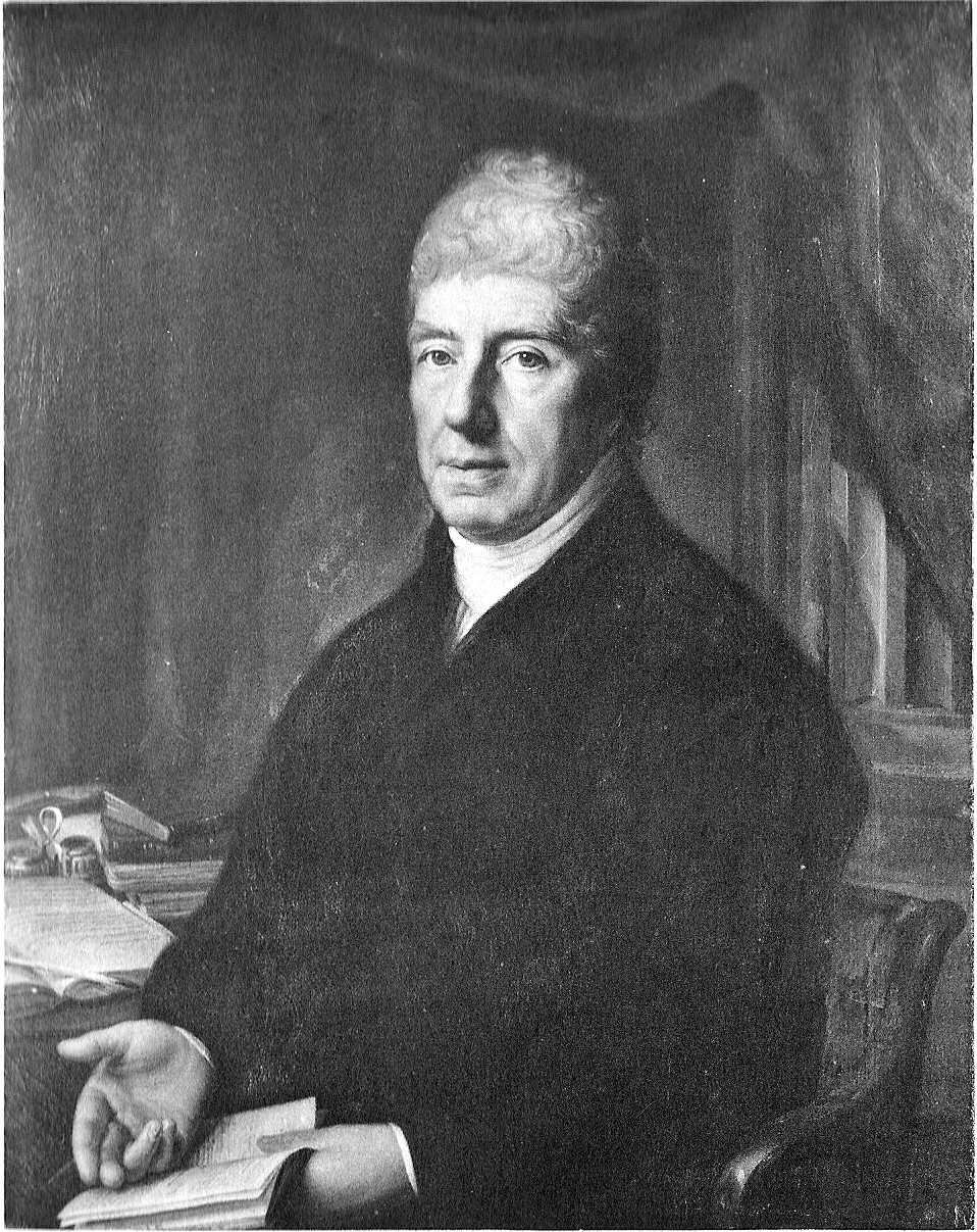 Bildnis des Johann Friedrich Petersen (1760-1845), Archdiakonus am Lübecker Dom, Direktor der Gesellschaft zur Beförderung gemeinnütziger Tätigkeit und erster Inhaber der Gedenkmünze Bene Merenti